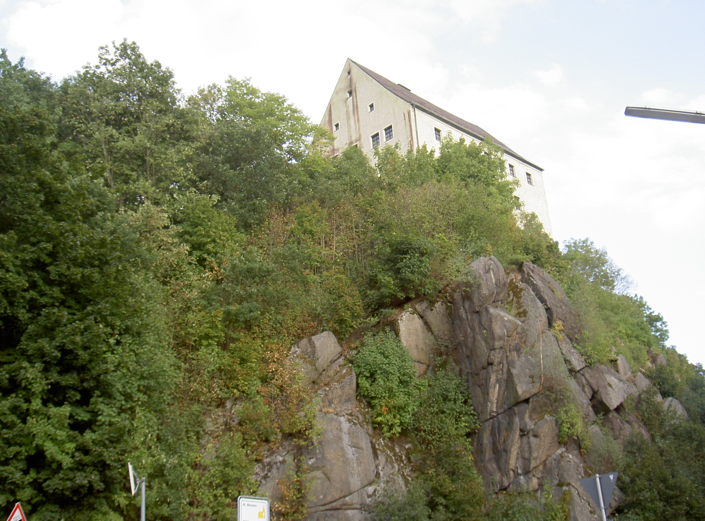 Granitfelswand (Geotop), darüber Burg Neuhaus